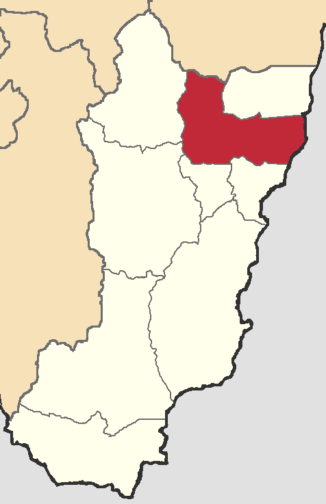 Mapa localizador del cantón en Zamora Chinchipe, Ecuador